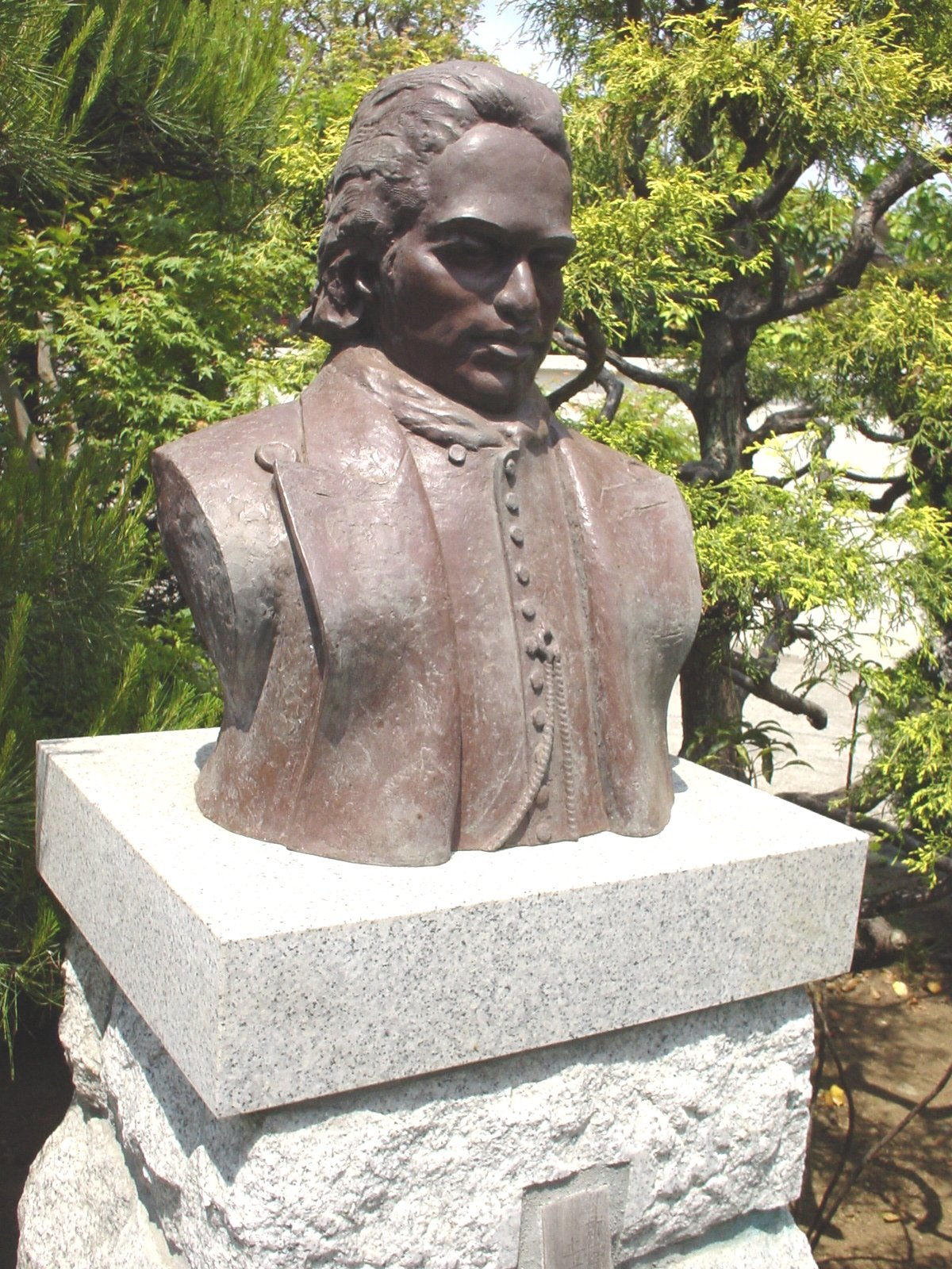 土方歳三の胸像（土方歳三資料館）